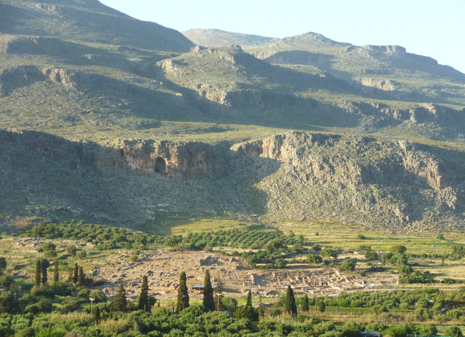 Vue d'ensemble du site de Kato Zakros, Crète